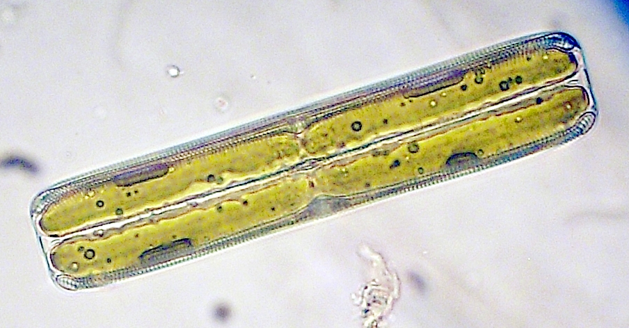 Gürtelbandansicht Pinnularia sp., in Teilung, Teich im Wald des Furlbachtals, Juni 2009